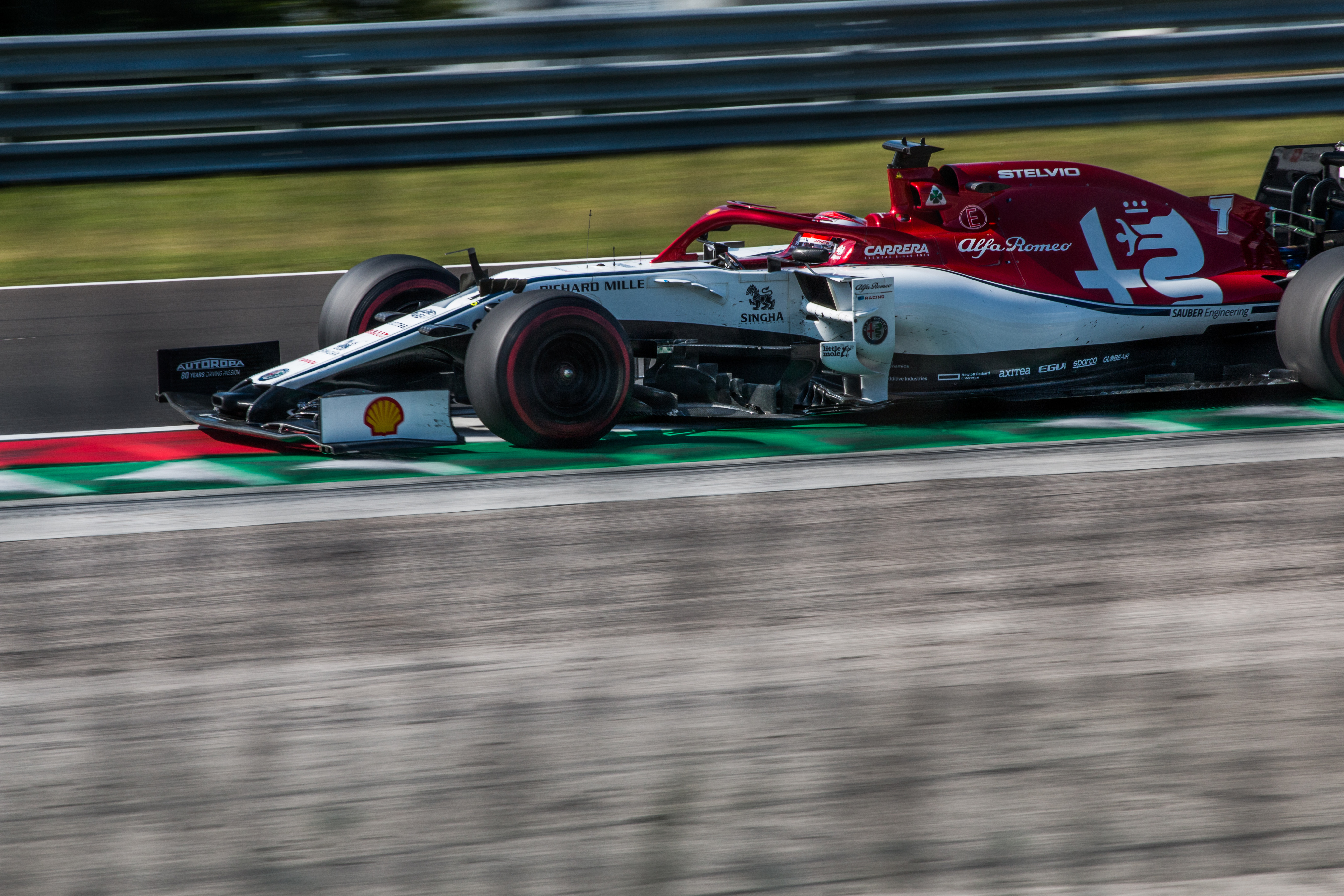 Kimi Raikkonen in his Alfa Romeo Racing C38 during Formula 1 Hungarian Grand Prix 2019 on the Hungaroring